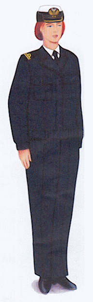 Rysunek ten pochodzi z załącznika do rozporządzenia ministra obrony narodowej z dnia 2 grudnia 2004 r. w sprawie wzorów oraz noszenia umundurowania i oznak wojskowych przez żołnierzy zawodowych i kandydatów na żołnierzy zawodowych.